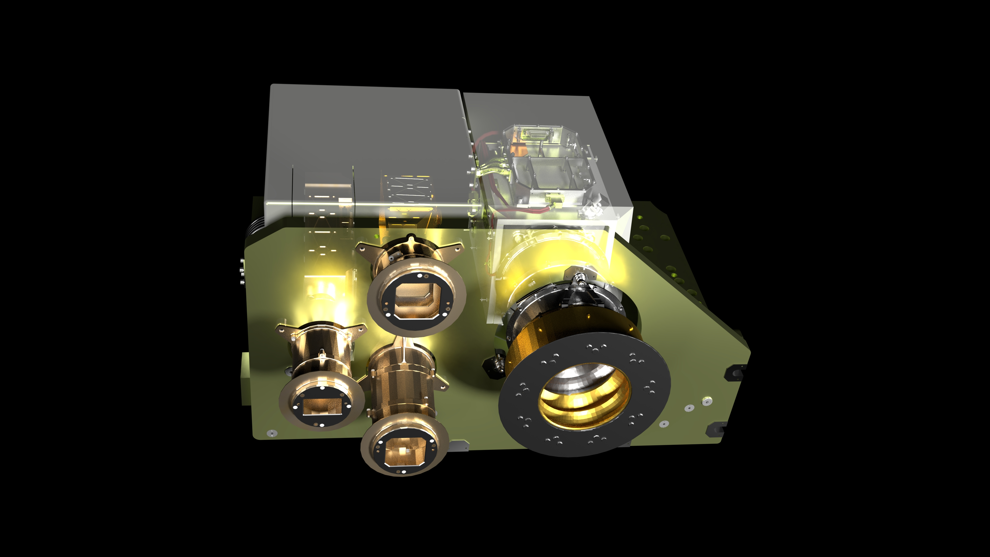 SIMBIO-SYS